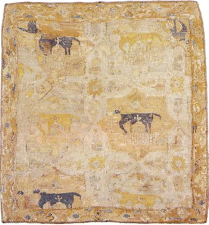 армянский ковер из Исхафана